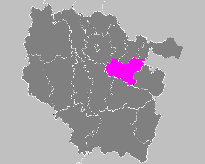 Maps of arrondissements and cantons of France: Arrondissement de Château-Salins.PNG